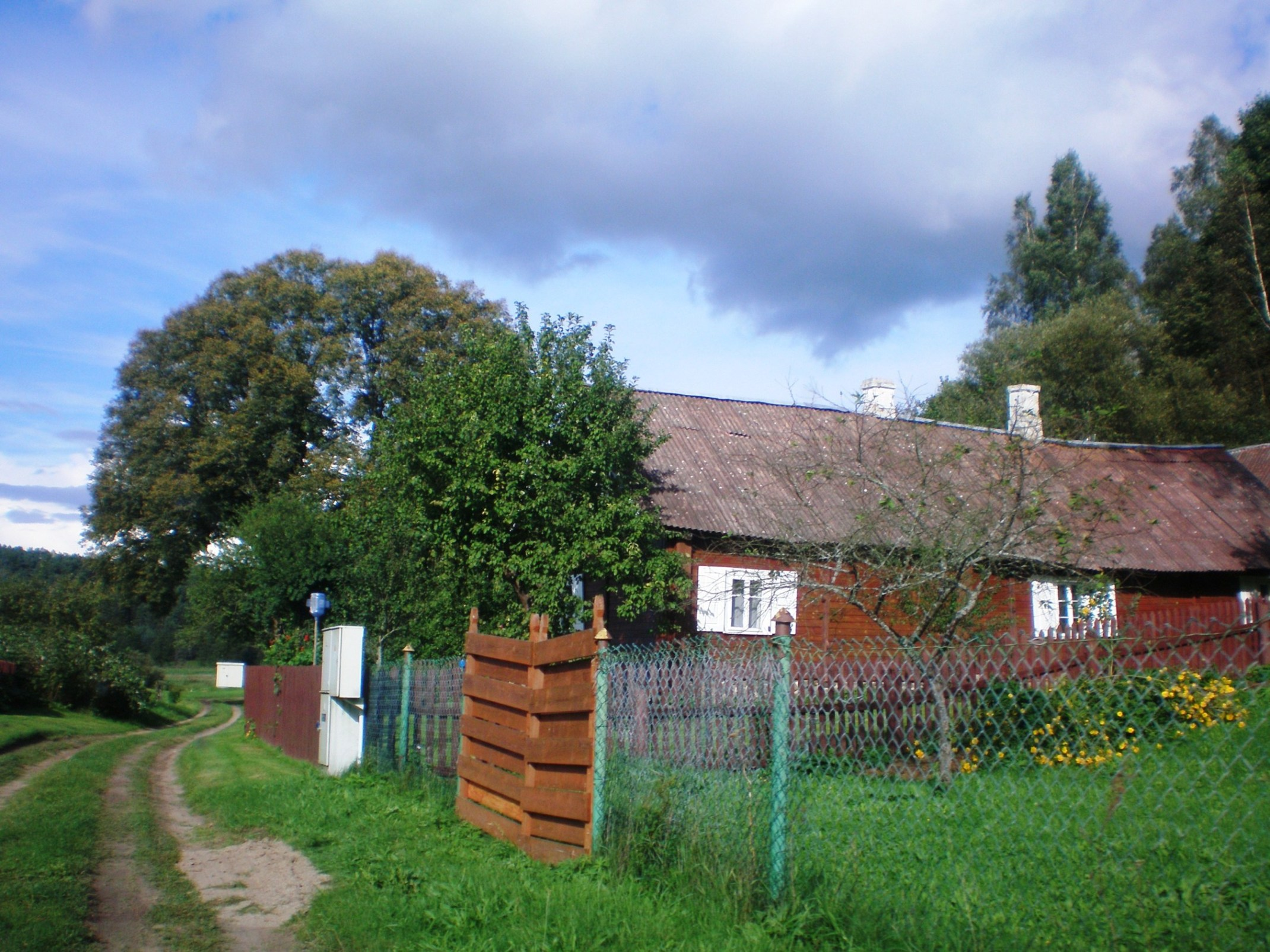 Česukai, Varėnos raj.